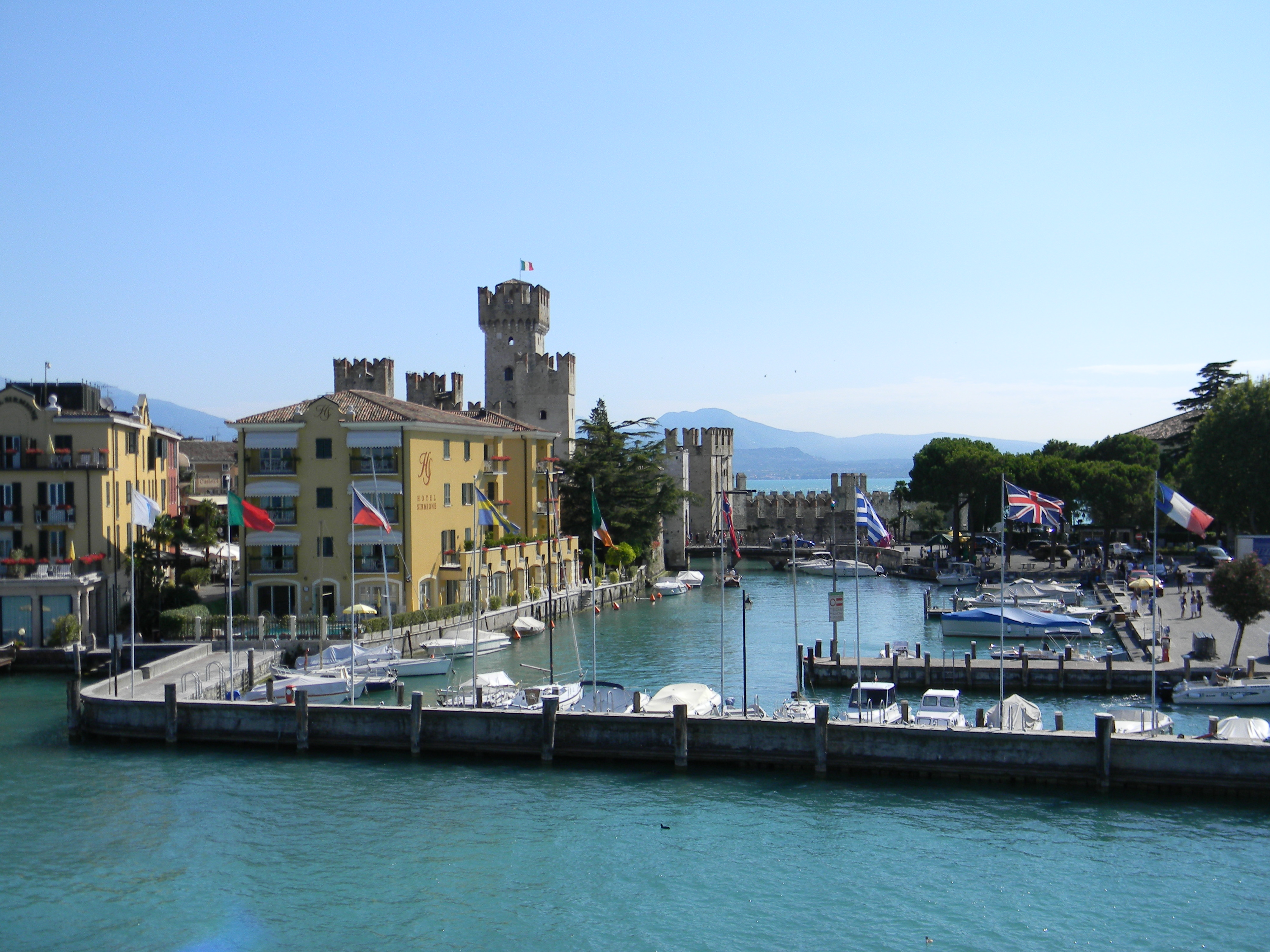 Château et port de plaisance de Sirmione en Italie, vu depuis le lac de Garde.